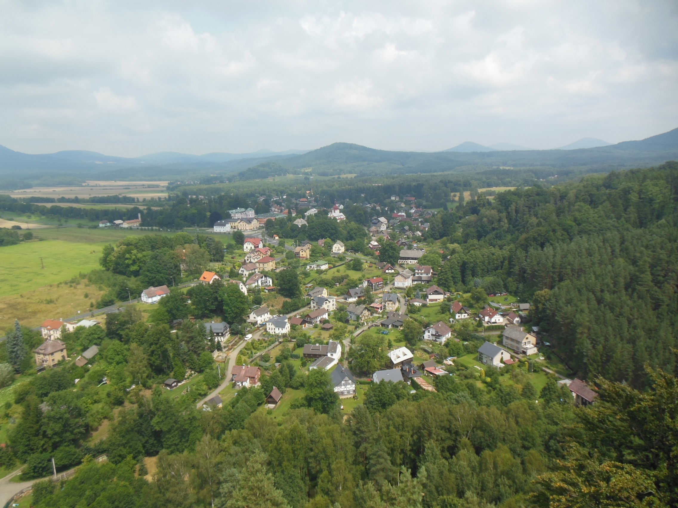 Sloup v Čechách (okres Česká Lípa). Rozhledna Na Stráži, pohled na Sloup.